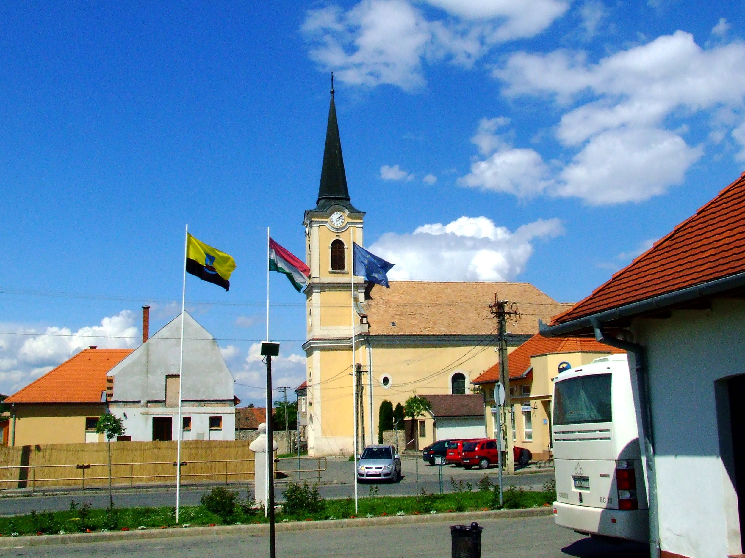 A szászvári Nagyboldogasszony-templom. 1772-ben kezdték építeni, 1779. május 3-án szentelték fel. This is a photo of a monument in Hungary. Identifier: 1953